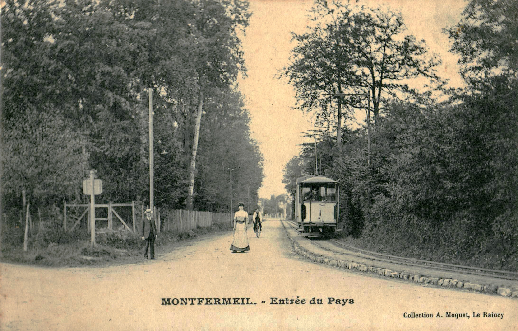 Carte postale ancienne éditée par Moquet au Raincy :MONTFERMEIL - Entrée du Pays